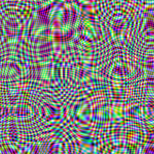 Plasma (interferensmönster).